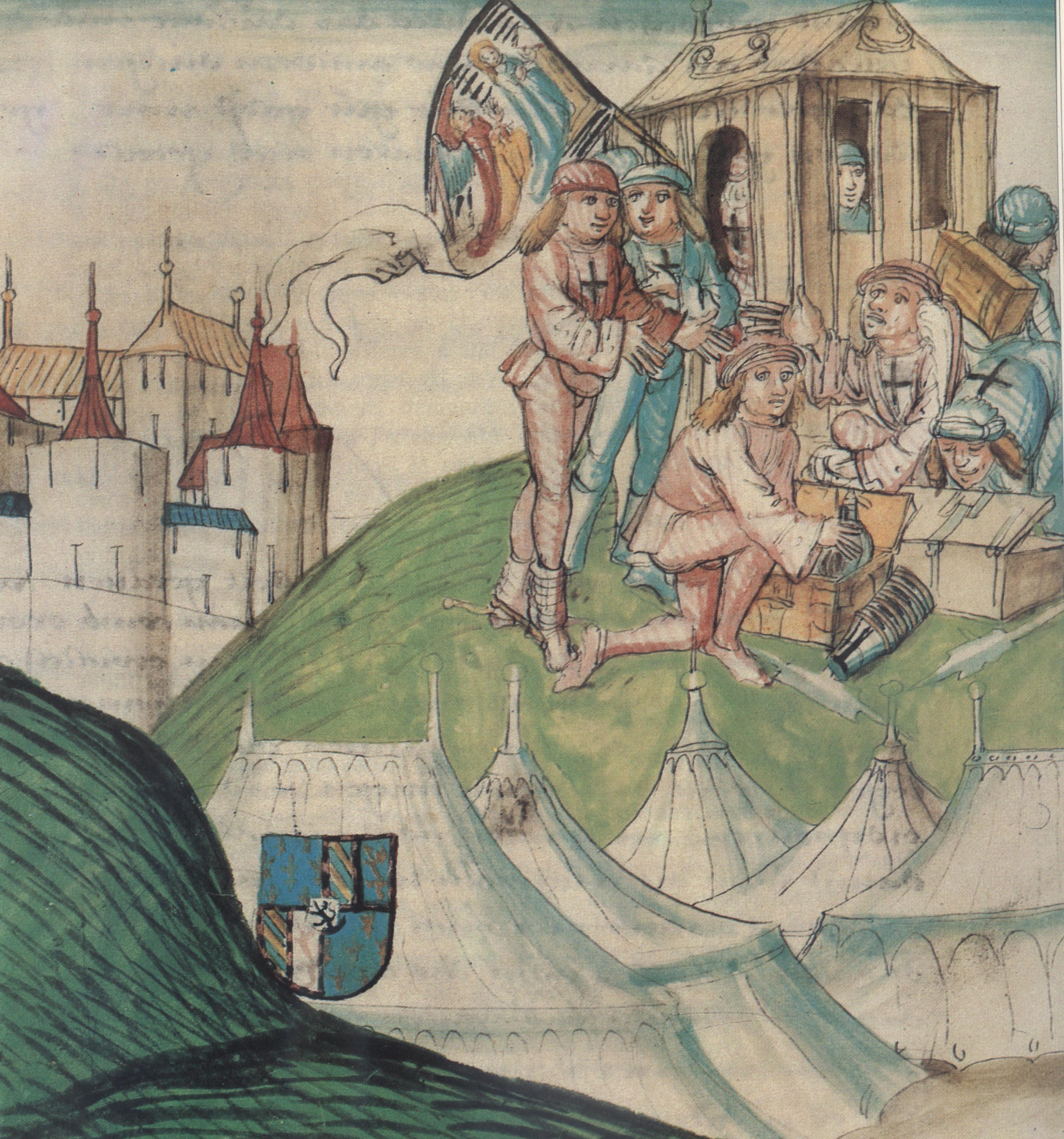 Reneo la 2-a post la batalo de Morato 1476